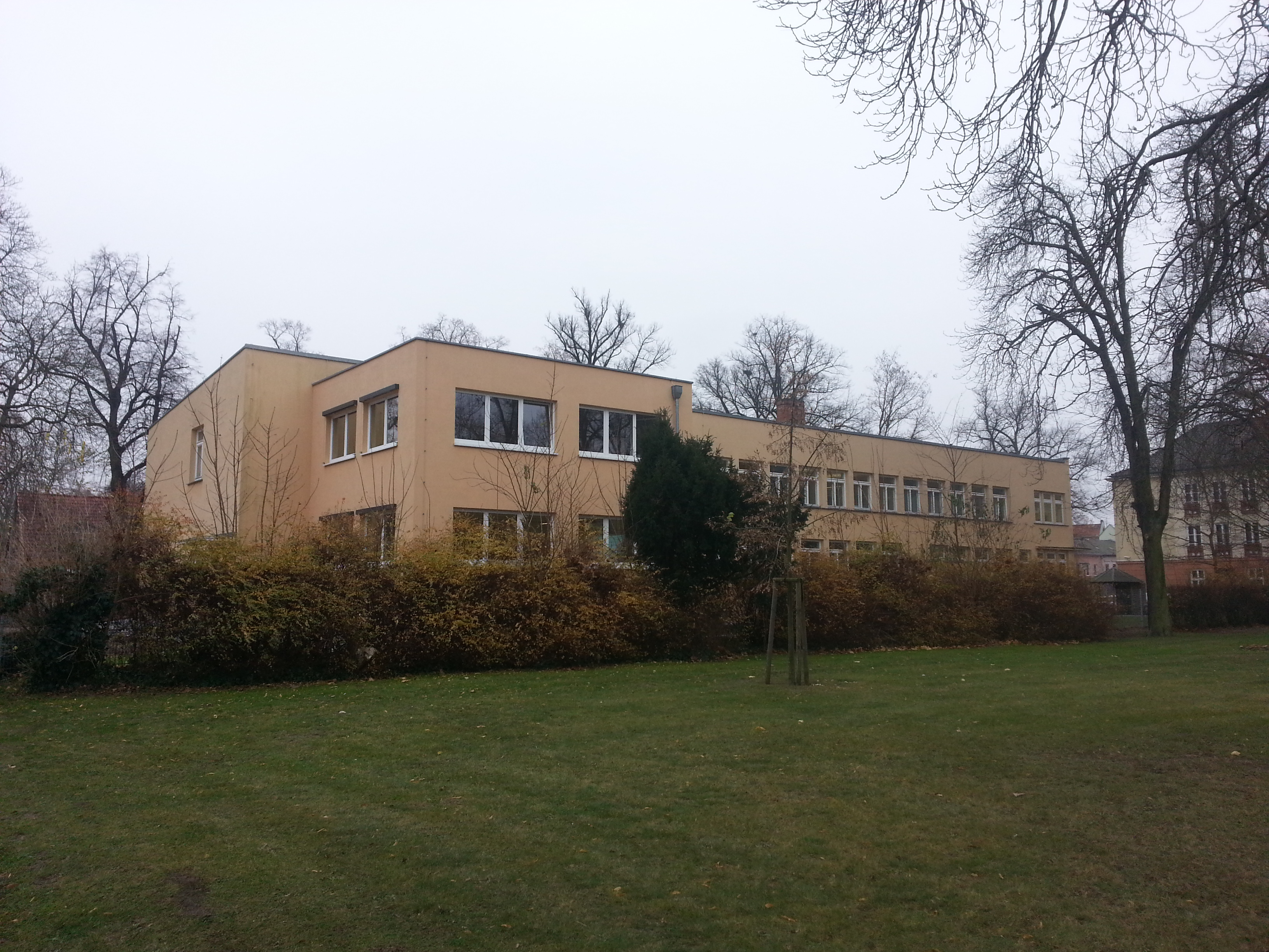 Medizinische Schule des städtischen klinikums brandenburg am gertrud-piter-platz